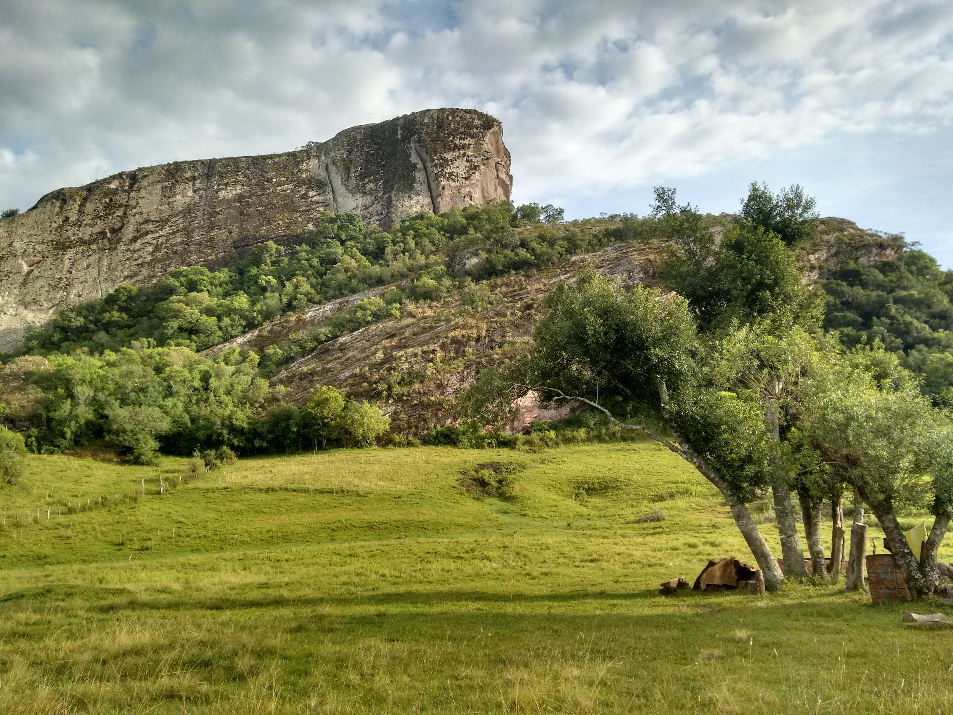 Camping do Sr. Álvaro em Minas do Camaquã, Caçapava do Sul, RS